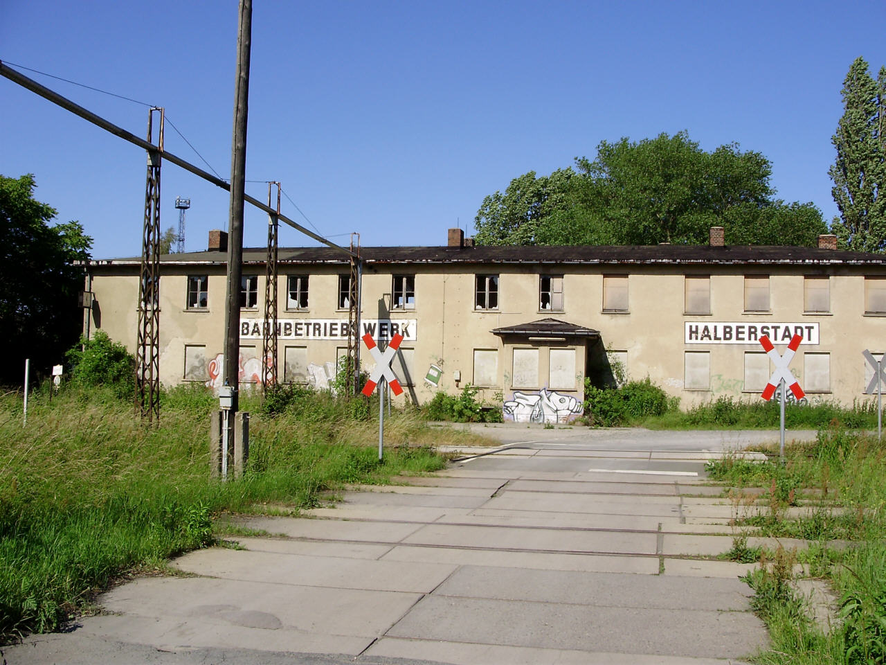 Ehemalige Lokleitung des Bw Halberstadt im Juni 2009